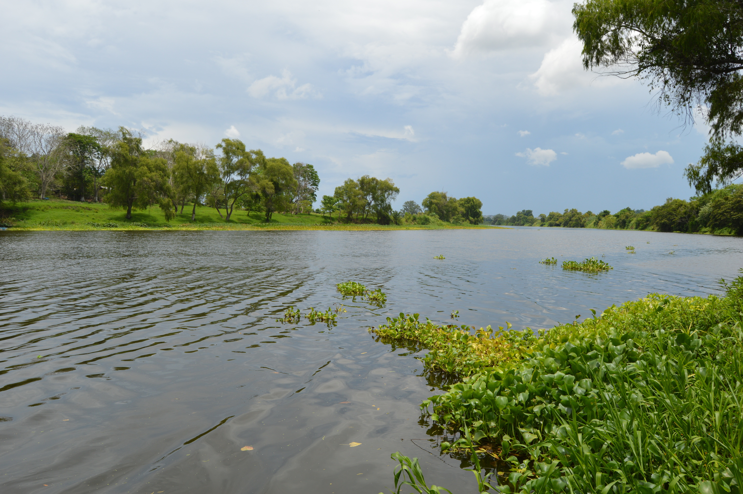 Rio Cazones a la altura del chalán en Cazones, Veracruz